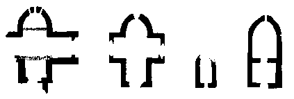 Фундаменты одноапсидных церквей Нижнего Архыза.